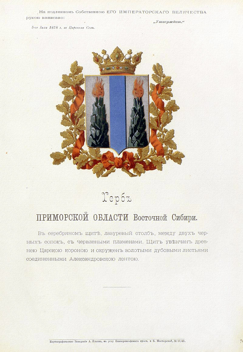 Official Russian Empire coat of arms Primorsk Oblast. Герб Российской Империи Приморской области с официальным описанием в Гербовнике Бенке. Утверждён Императором Всероссийским Александром Вторым в 1878 году.